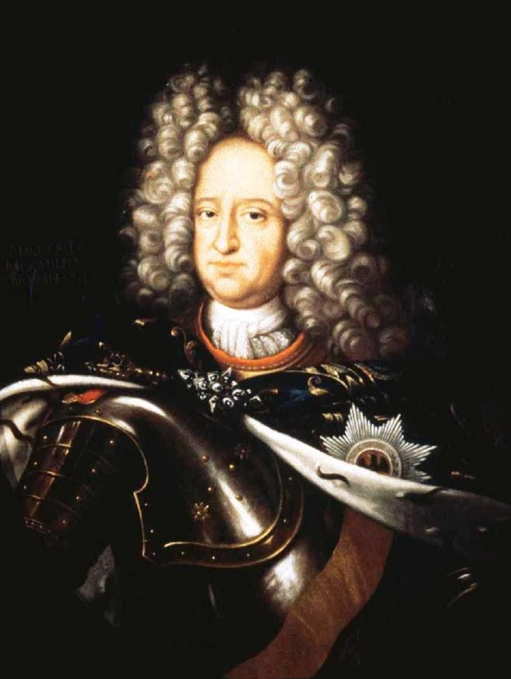 Wilhelm Moritz (1651-1724), Graf zu Solms, Braunfels, Greifenstein und Hungen, auch zu Tecklenburg und Crichingen, Herr zu Münzenberg, Püttingen, Dorschweiler und Beaucour; königlich-preußischer Wirklicher Geheimer Rat und Staatsminister, Ritter des Schwarzen Adler-Ordens